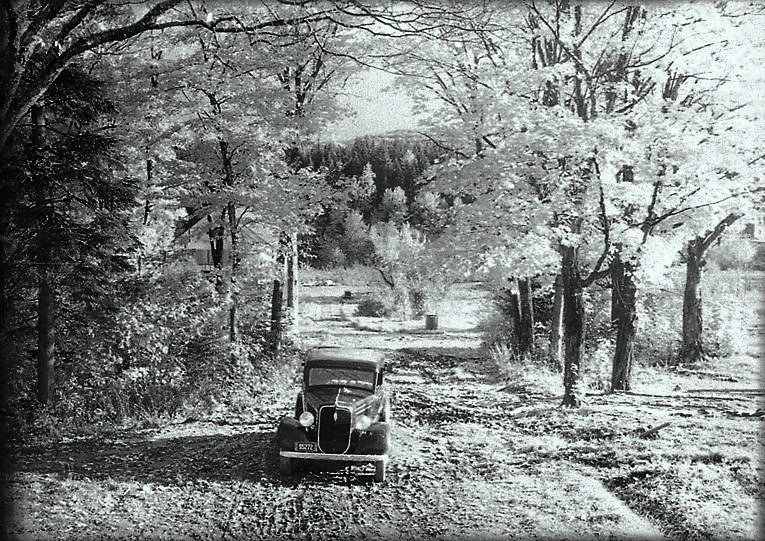 Aspect automnal de Duchesnay